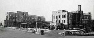 Japanese-Manchurian Soldier's hall（日满军人会馆）